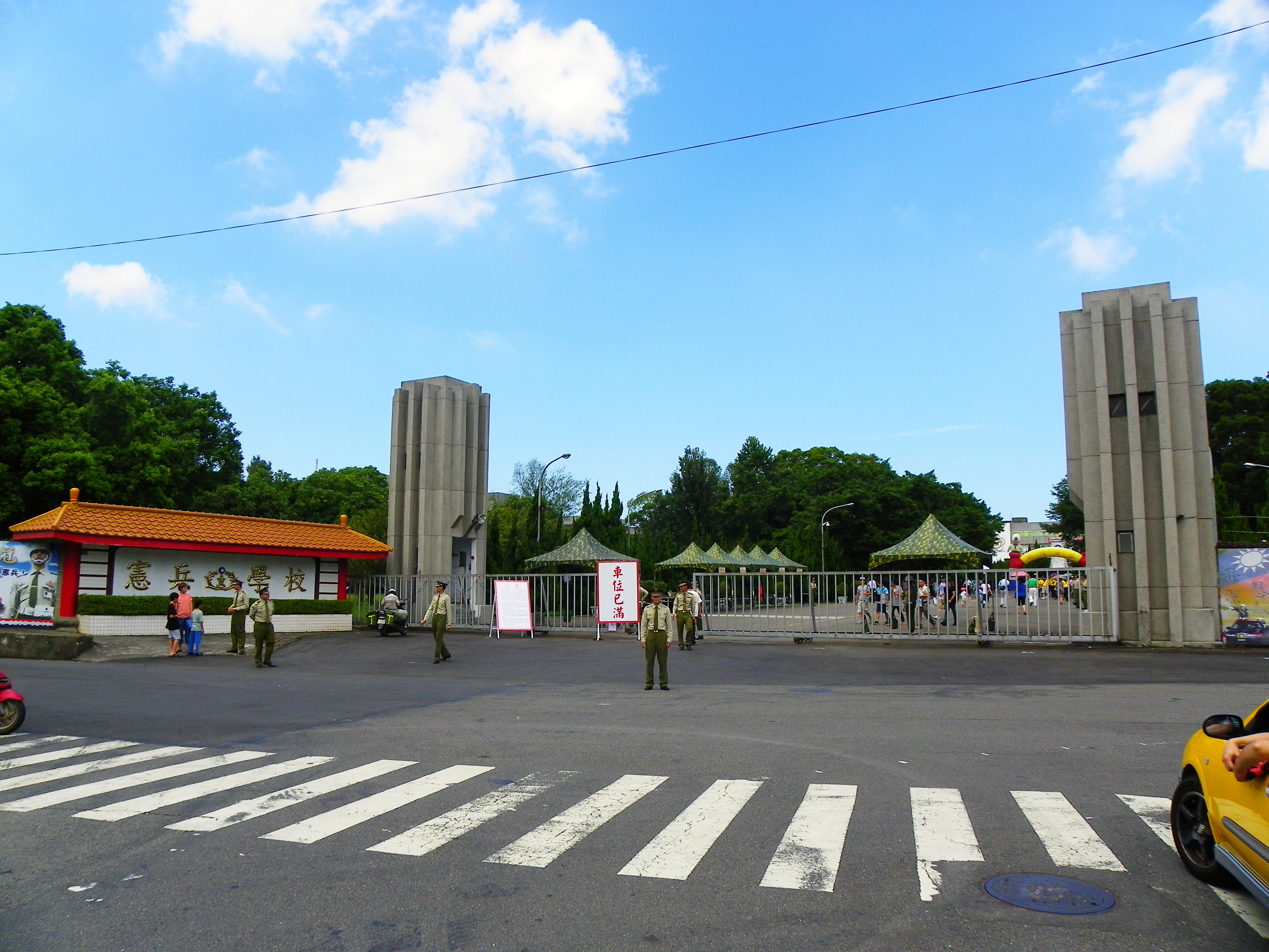 中華民國憲兵學校龜山校區（慧敏營區）南大門，位於桃園市龜山區文三一街與文三二街口，左方釘掛「憲兵學校」四字與憲兵學校校徽。攝於2012年懇親會與營區開放活動。